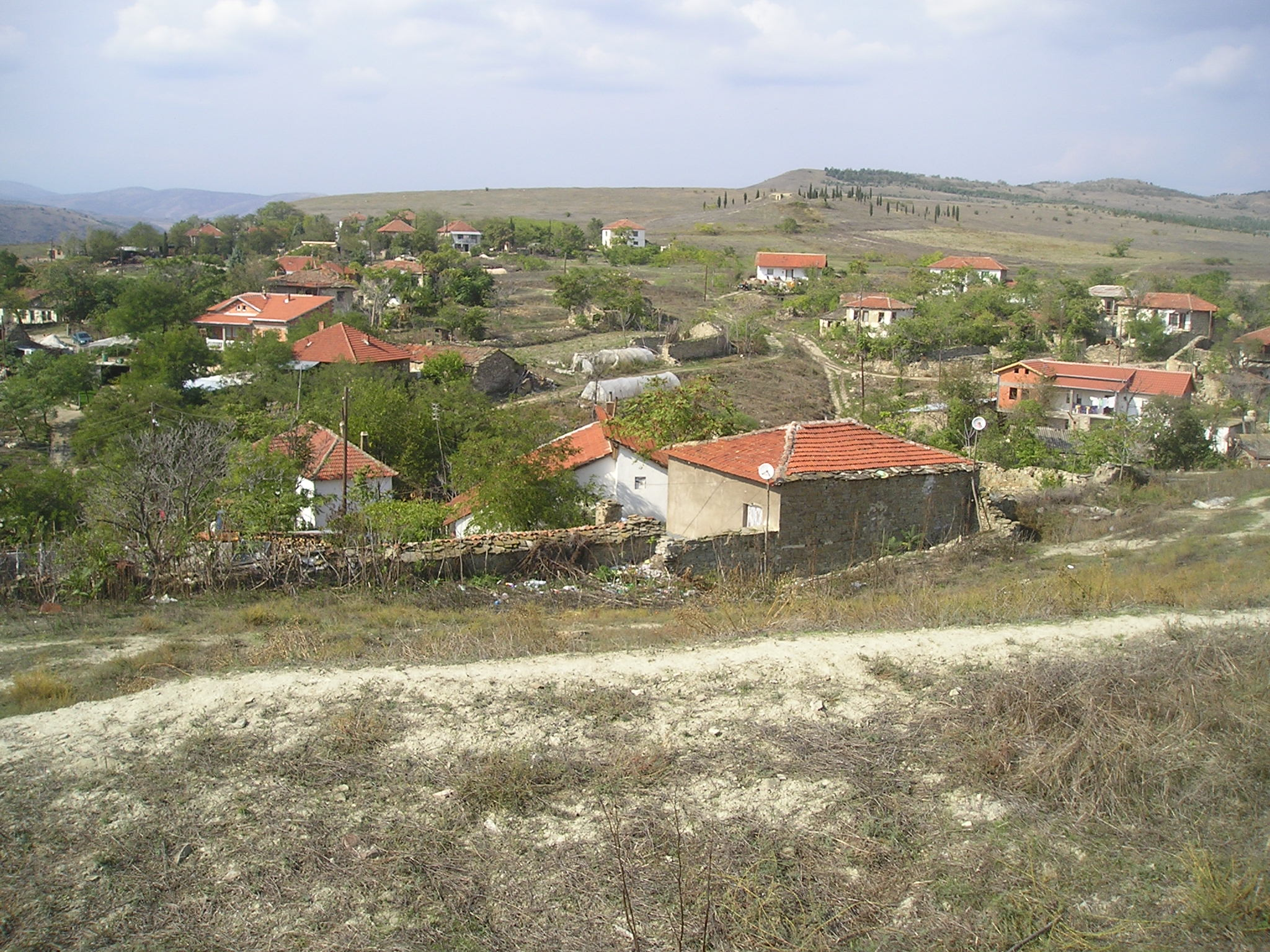 Горната махала на село Ногаевци, Република Македония.